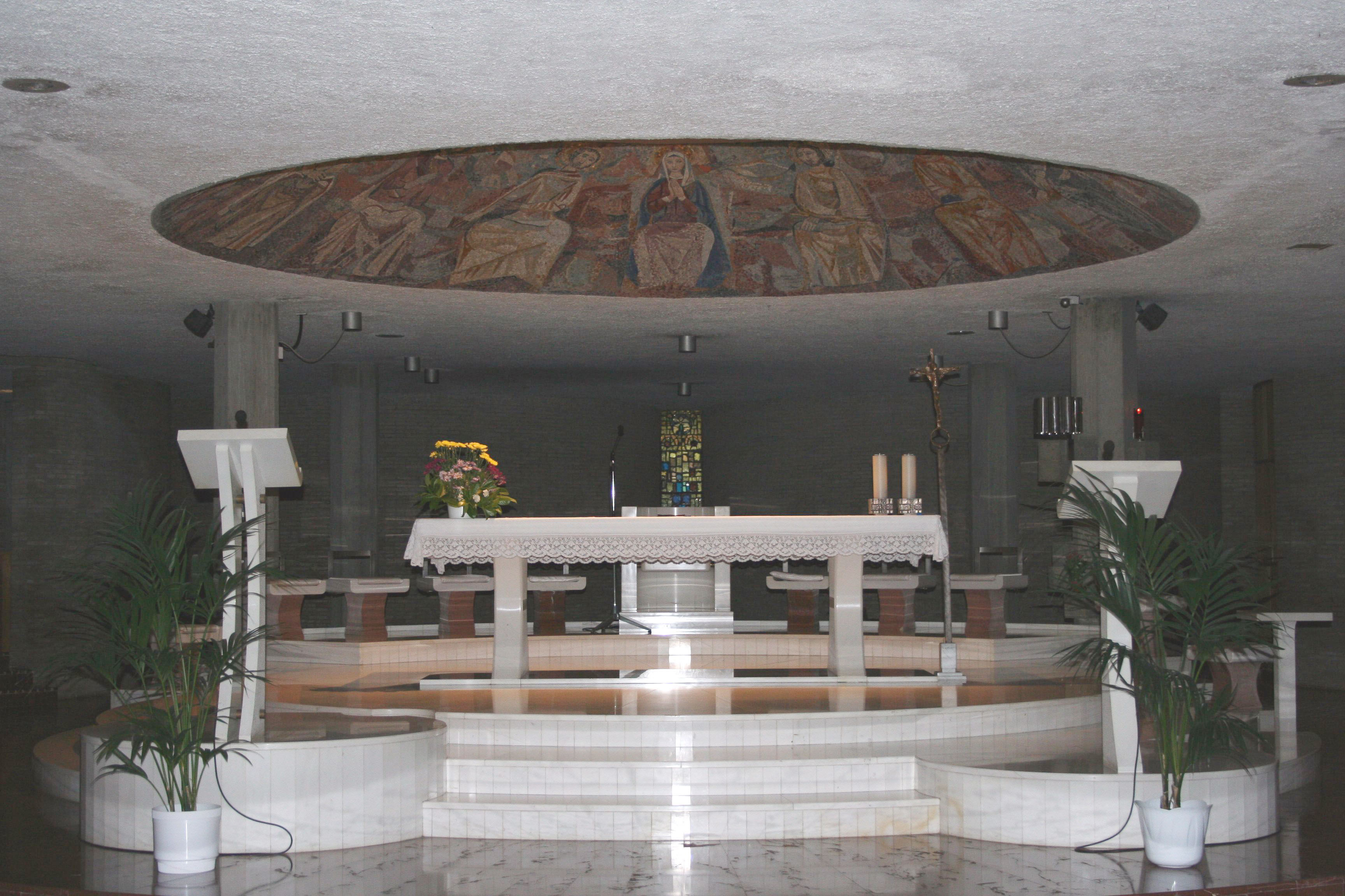 Dit is het marmeren altaar in de bovenkerk in Collevalenza. Foto gemaakt door Klementien op 10 september 2006. bron: eigen werk